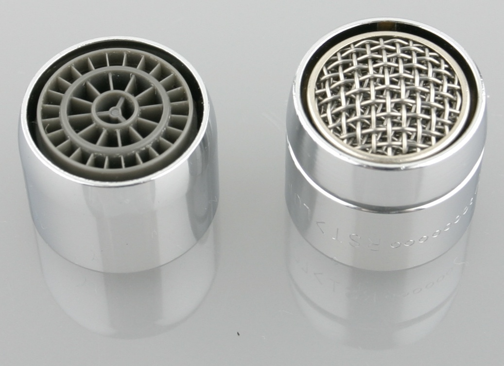 Strahlregler mit Mengenregler - Innen